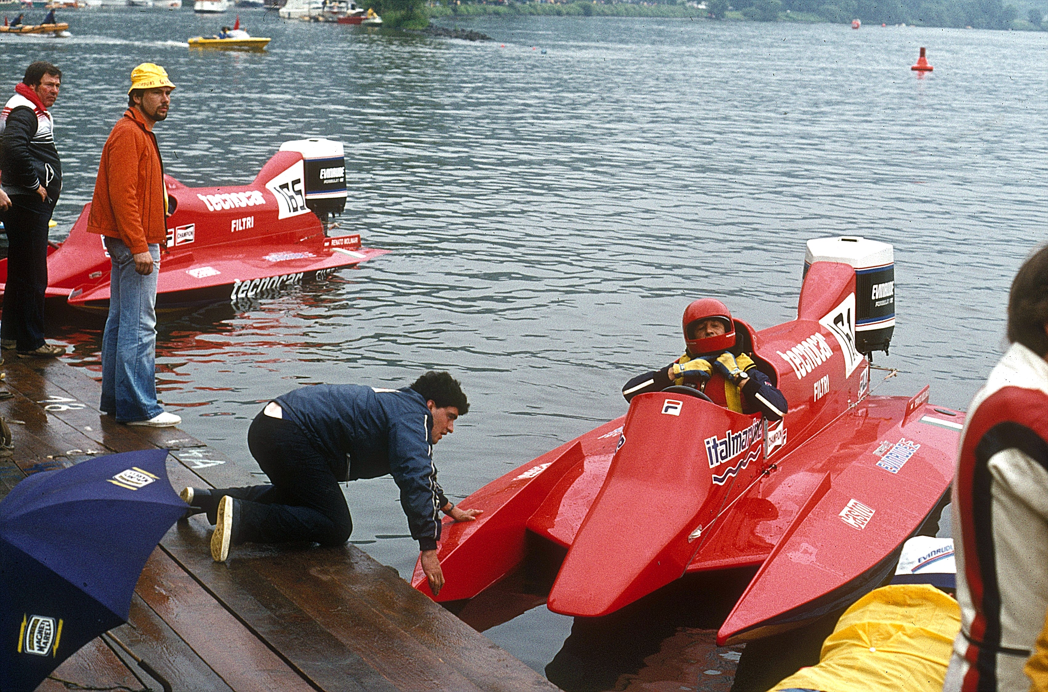 Colombo, Carlo Maria (Boot vorn rechts)